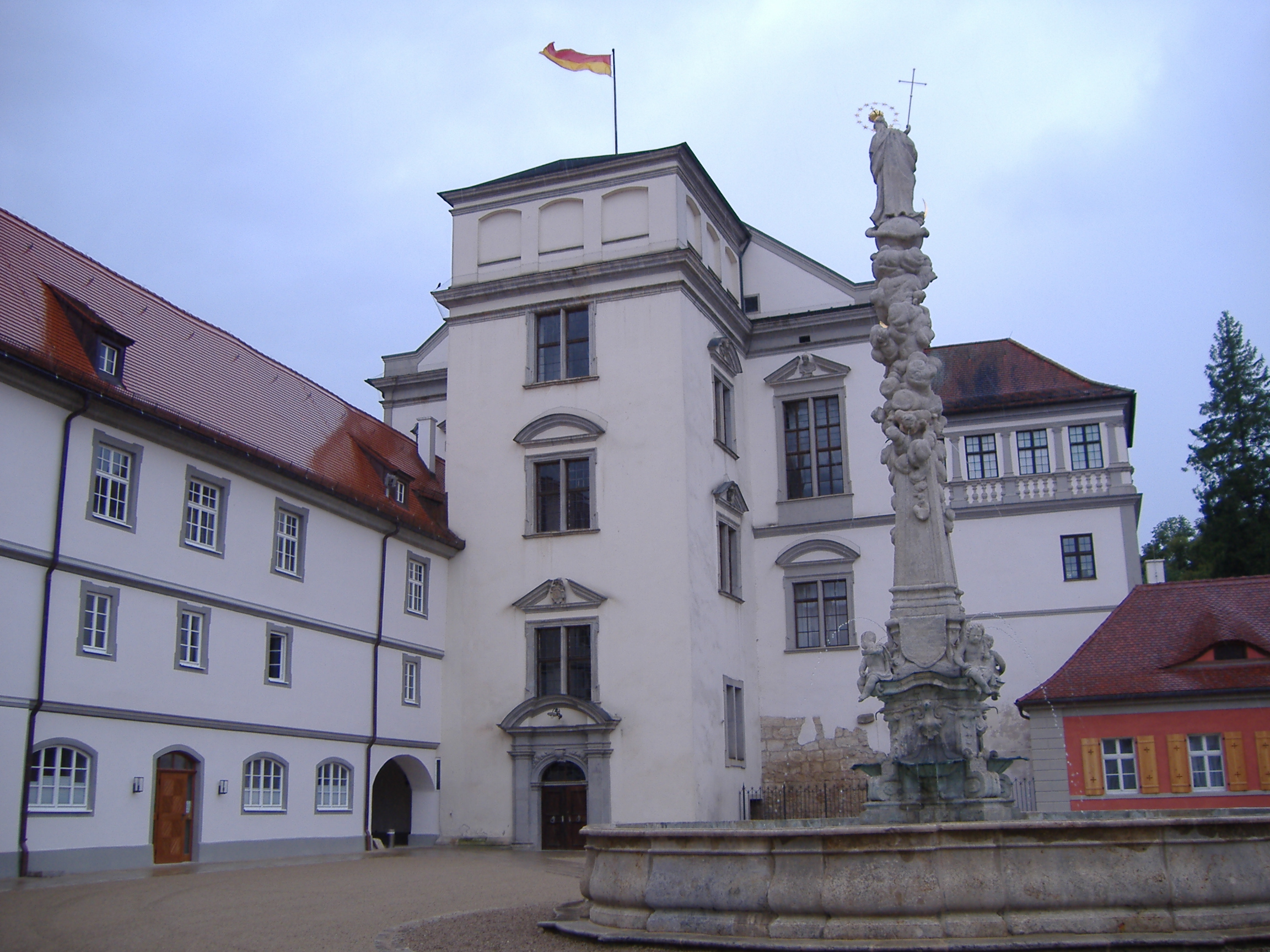 Innenhof Schloss Öttingen